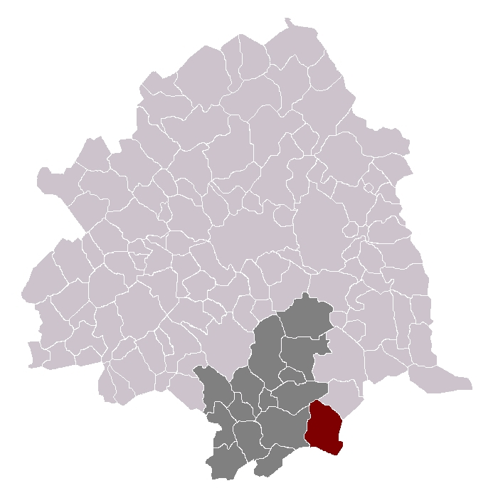 Bersée dans son canton et son arrondissement